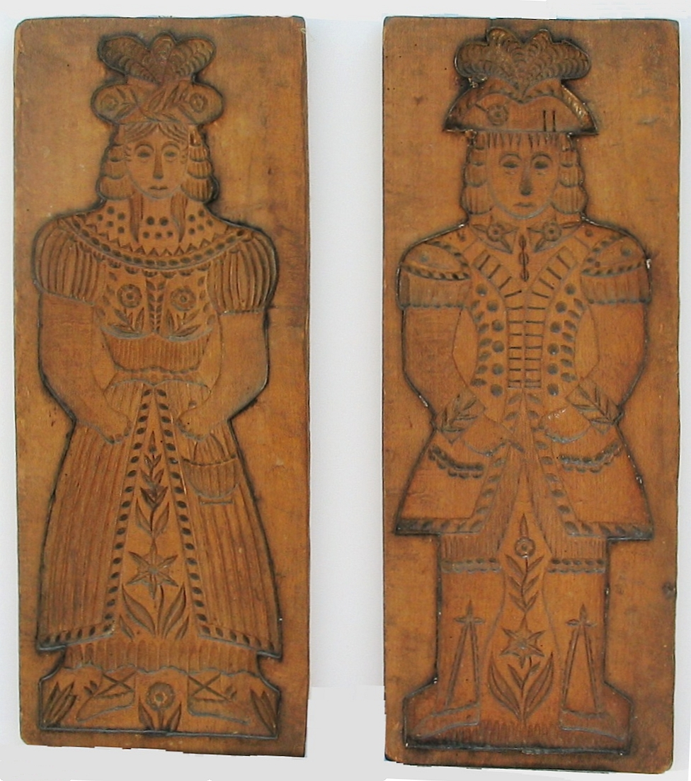 Formen für Aachener Printen ca. 1840. Napoleonischer Offizier und Marketenderin. Author is Frinck51.